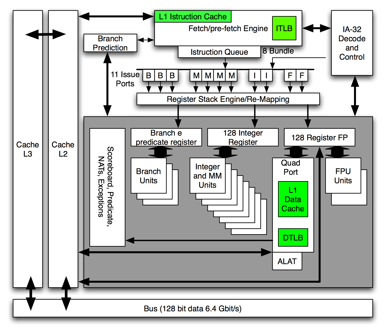 Architettura Intel Itanium